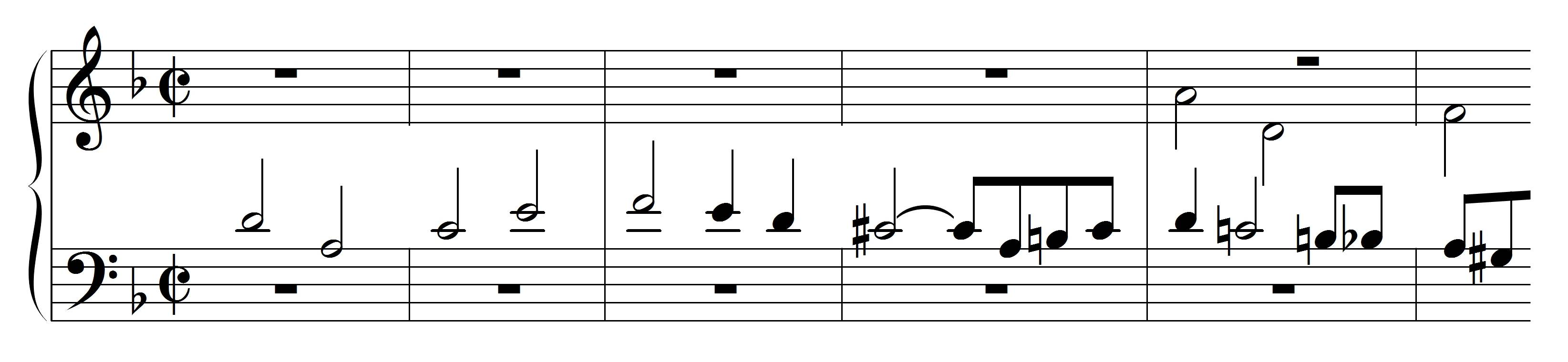 Bach, JS, Incipit Contrapunctus 3, BWV 1080